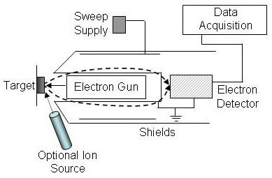 Auger electron spectroscopy experimental setup.